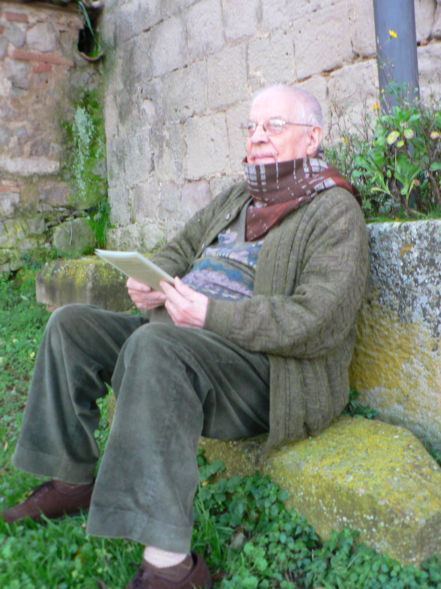 Mn. Climent Forner, capellà i poeta català resident a Viver i Serrateix (Berguedà)